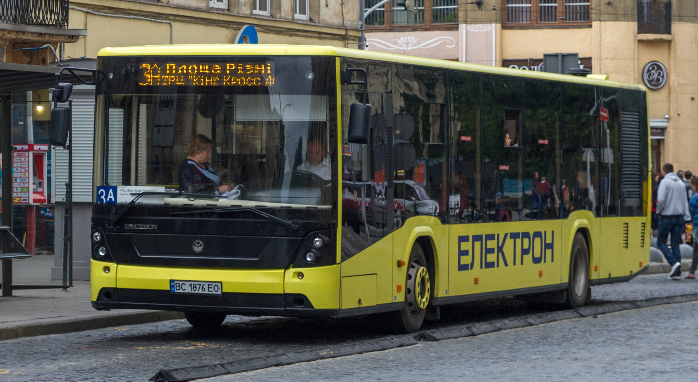 Electron A185 bus in Lviv